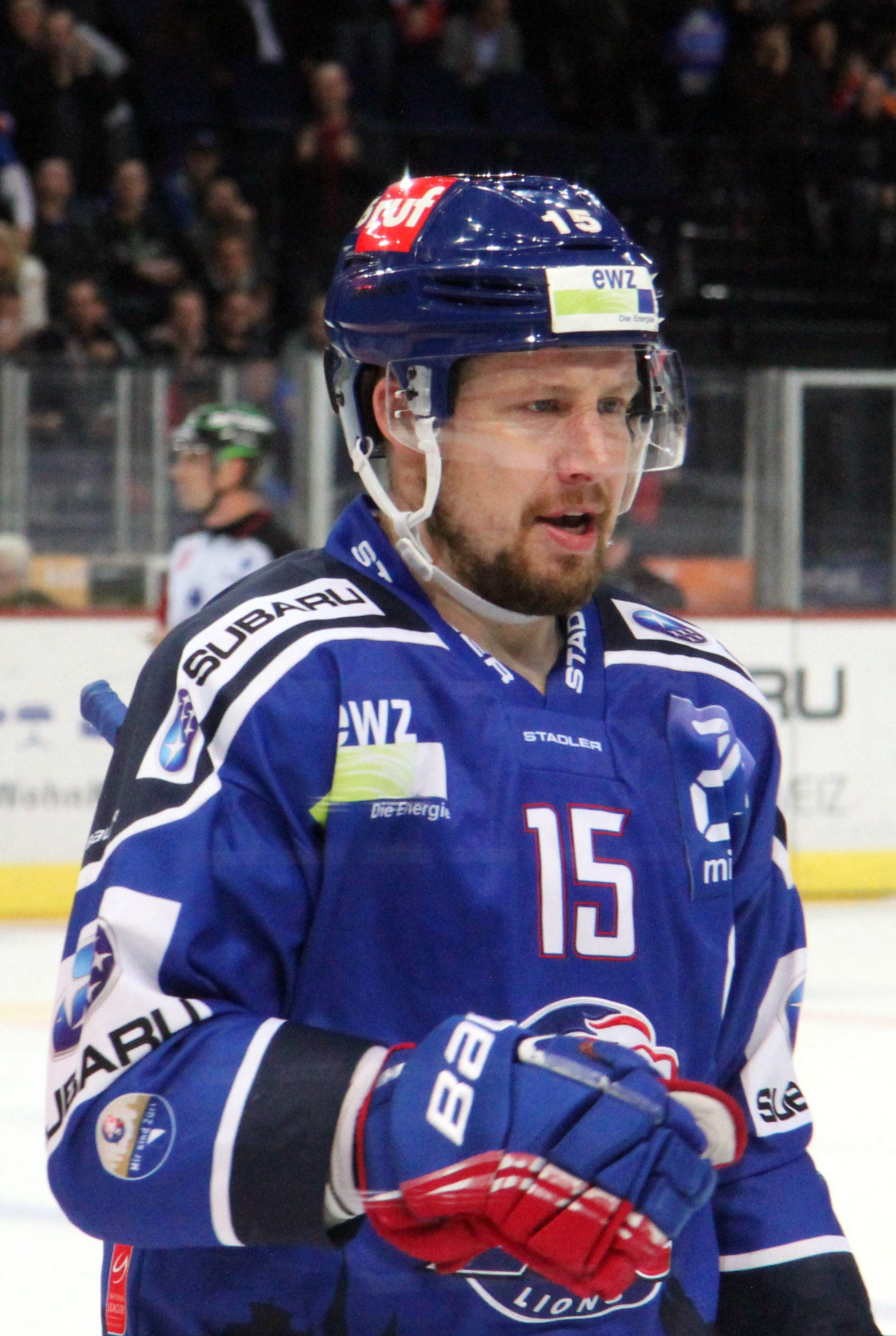 Mathias Seger (Z 15).